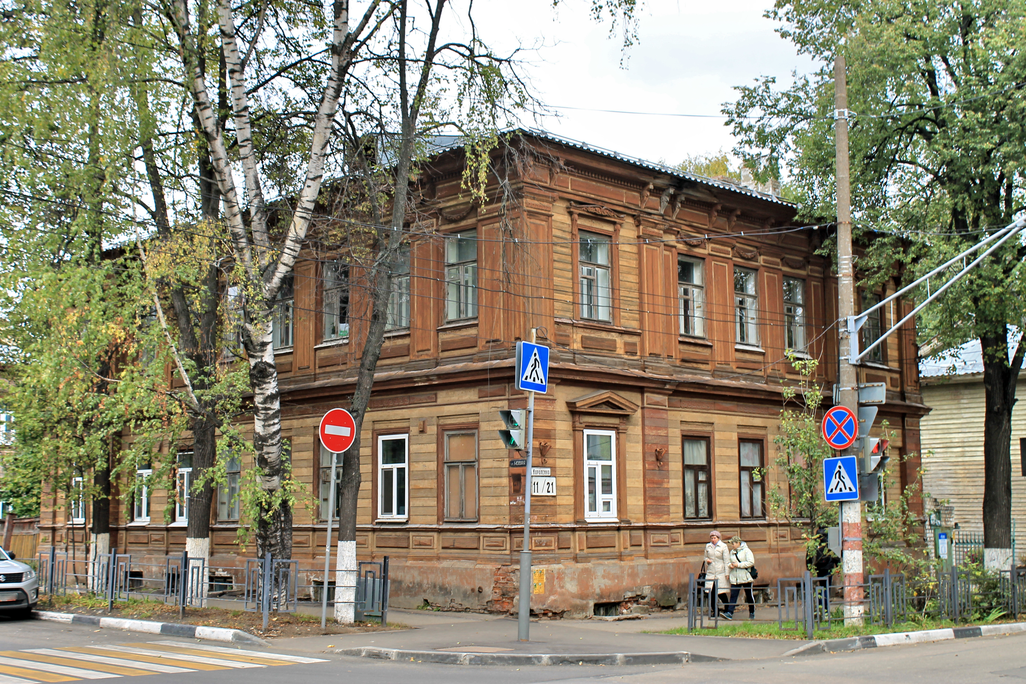 Дом архитектора В.М.Лемке: улица Новая, 21 / улица Короленко, 11, Нижний Новгород, Нижегородская область